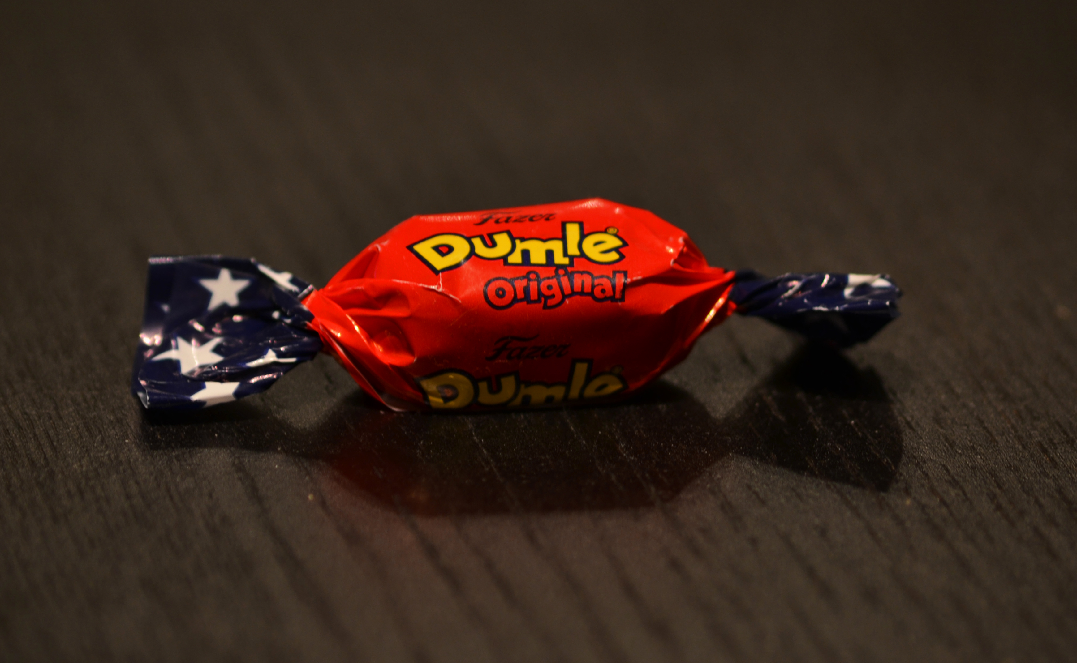 Dumlekola